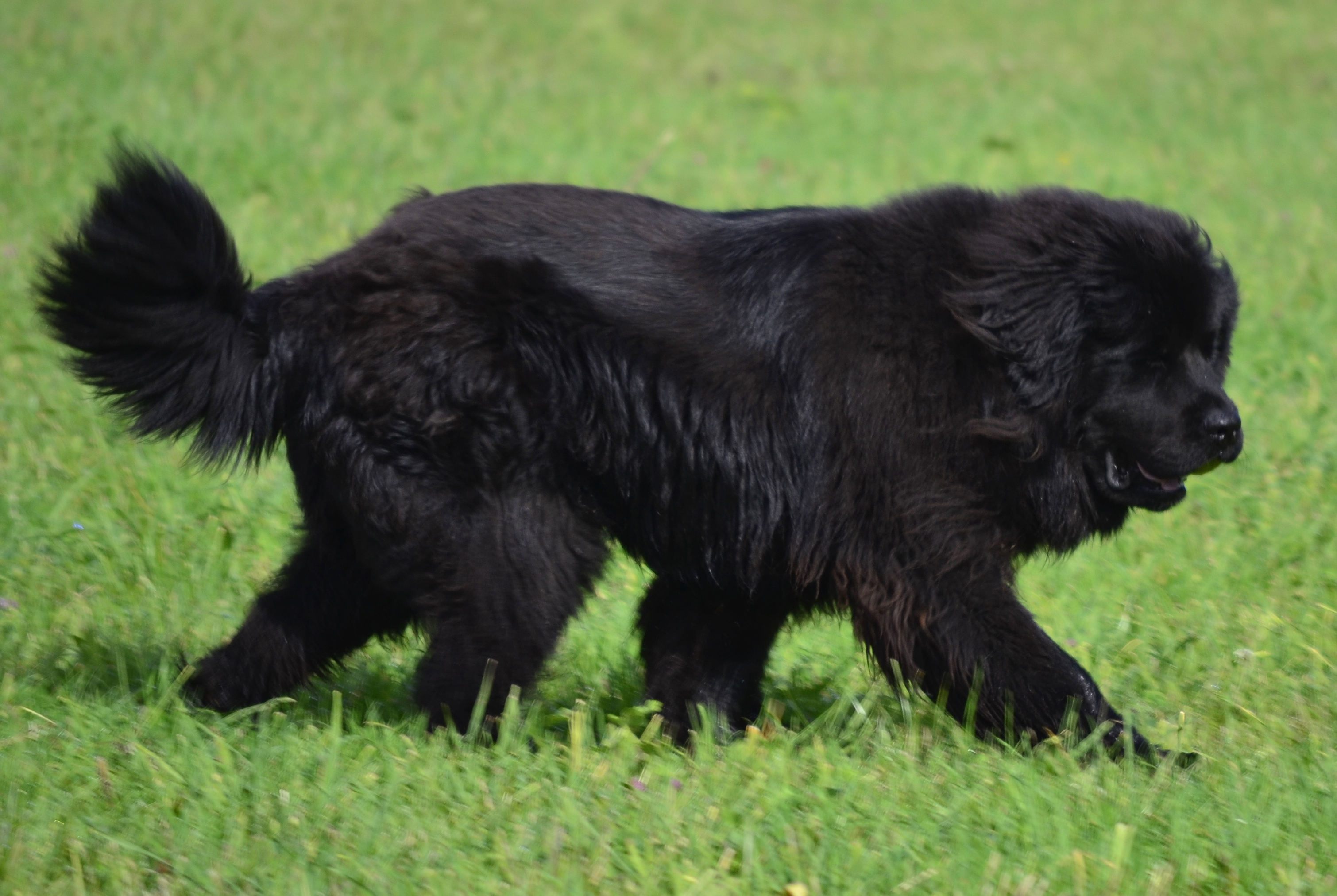 Neufundländer-Rüde "Angelo" (aka "Strauss Johann, Bär vom Gelderland", *12. Oktober 2011) im Alter von 12 Monaten auf den Wiesen bei Moosbrunn